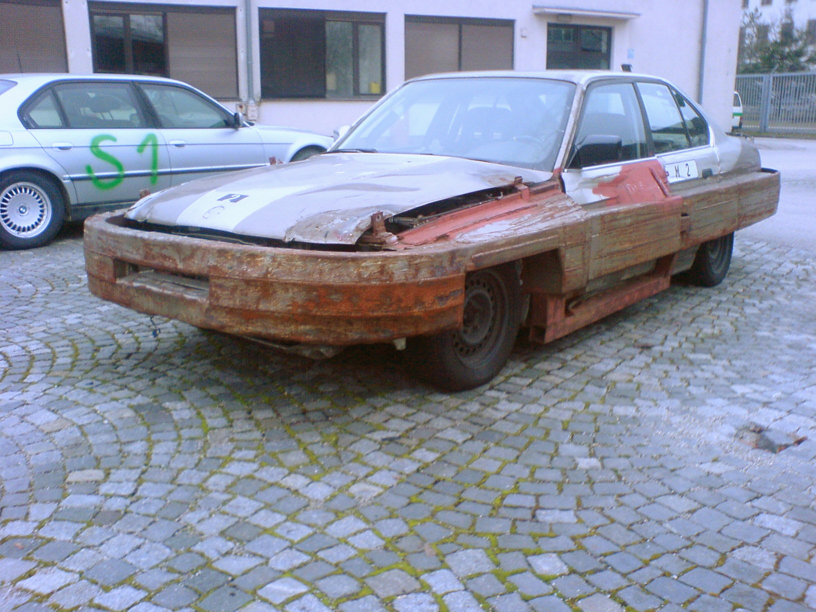 BMW 524 td ("M 2") mit massiven seitlichen Verstärkungen der Karosserie (z.T. Autobahn-Leitplanken), für taktische Übungen der Spezialeinheiten, z.B. Rammen/Stoppen von KFZ (Schwerstkriminalität/Terrorismus)